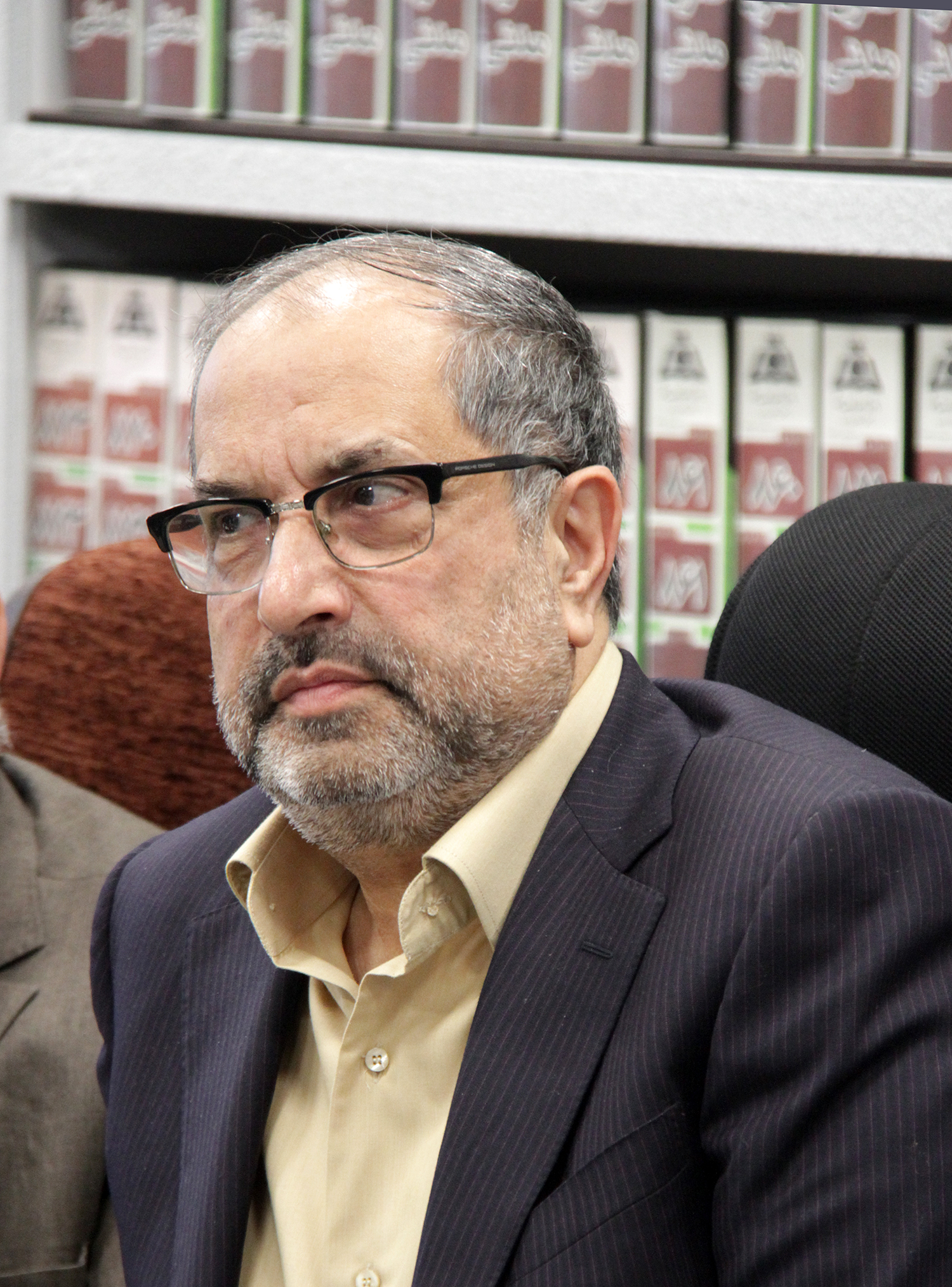 دکتر محمد جواد شریعت باقری در مرکز پژوهشی دانشنامه های حقوقی علامه